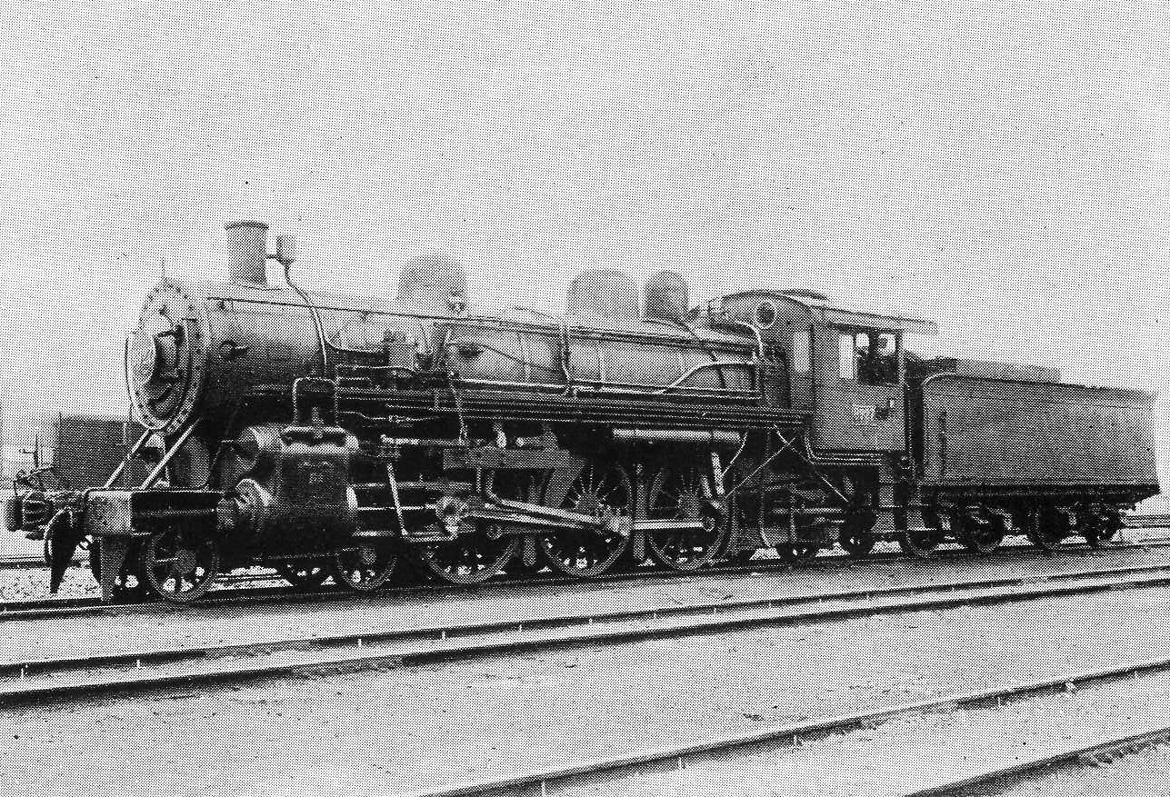 鉄道省8900形蒸気機関車